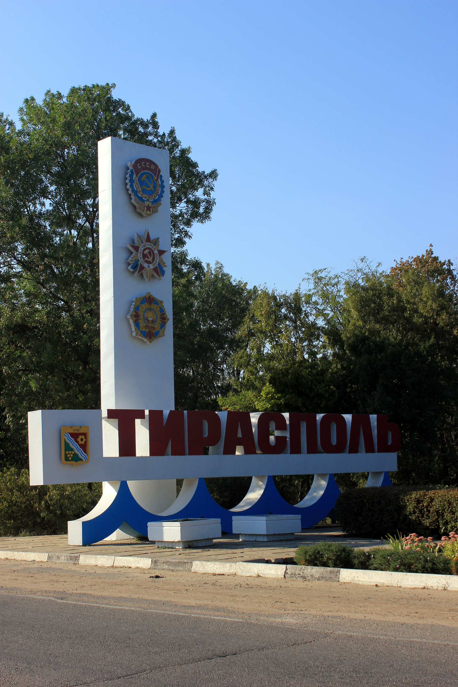 Willkommenstafel von Tiraspol, Transnistrien.